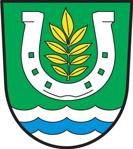 Obec Kovač se nachází v okrese Jičín